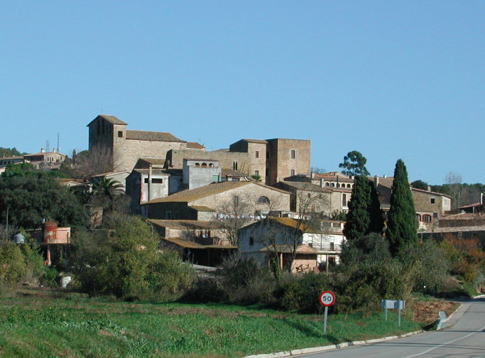 vista de Vilopriu des de la carretera